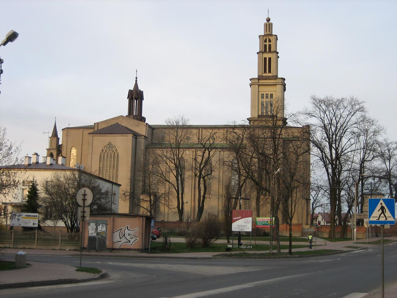 Sokołów Podlaski - Kościół Konkatedralny pw. św. Najświętszej Marii Panny